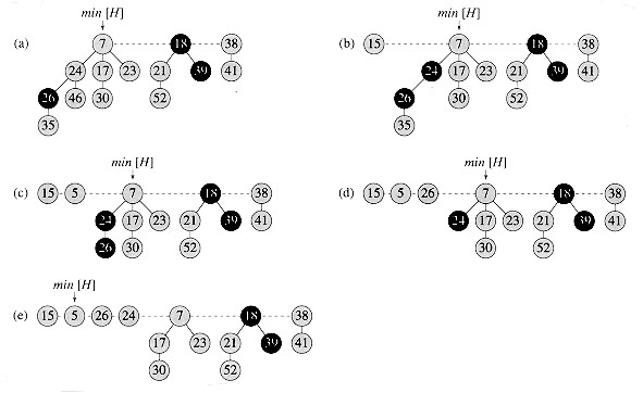 한국어 (조선): 피보나치 수열4